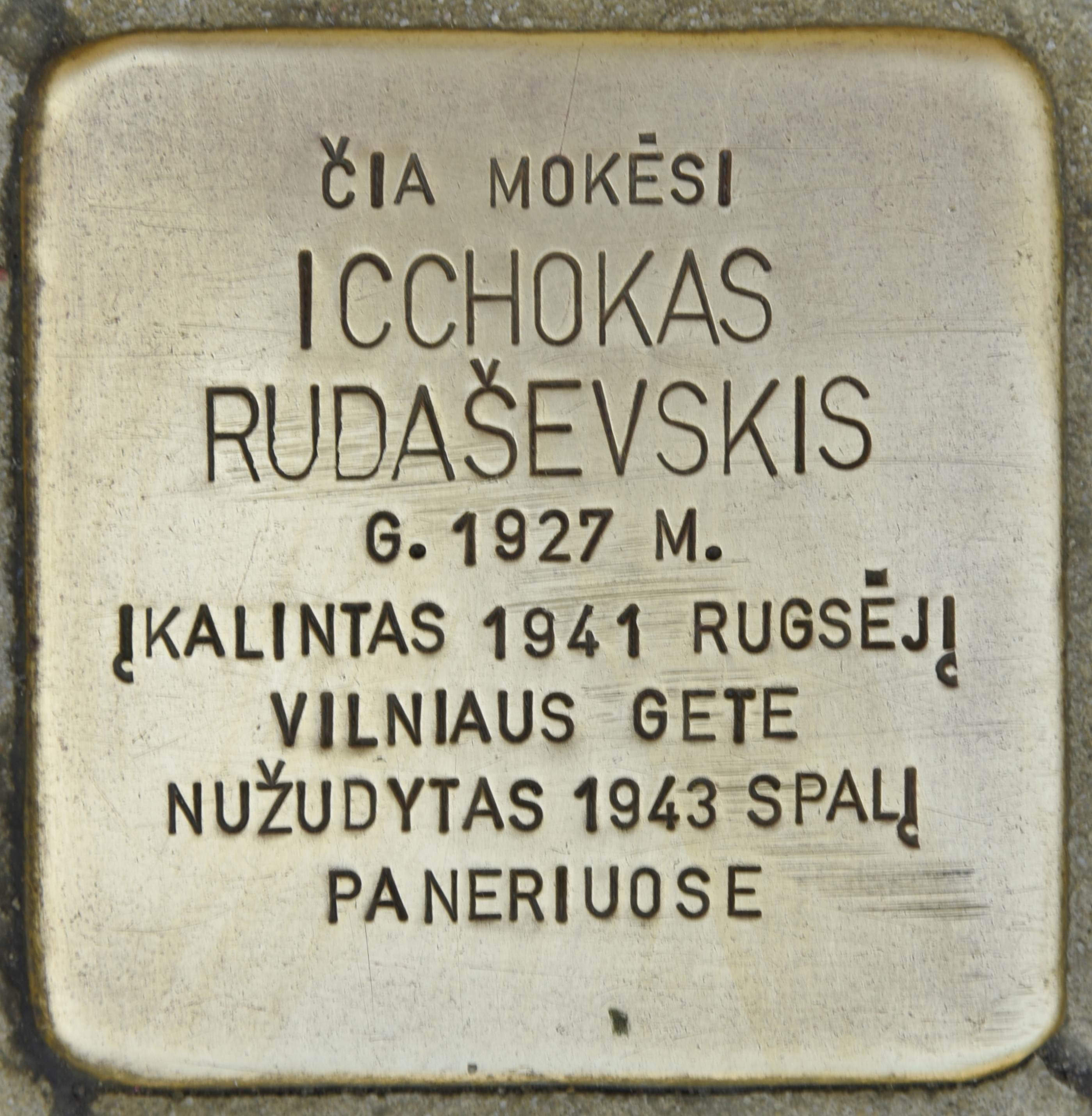 Stolperstein für Icchokas Rudasevskis, Rūdninkų St. 8